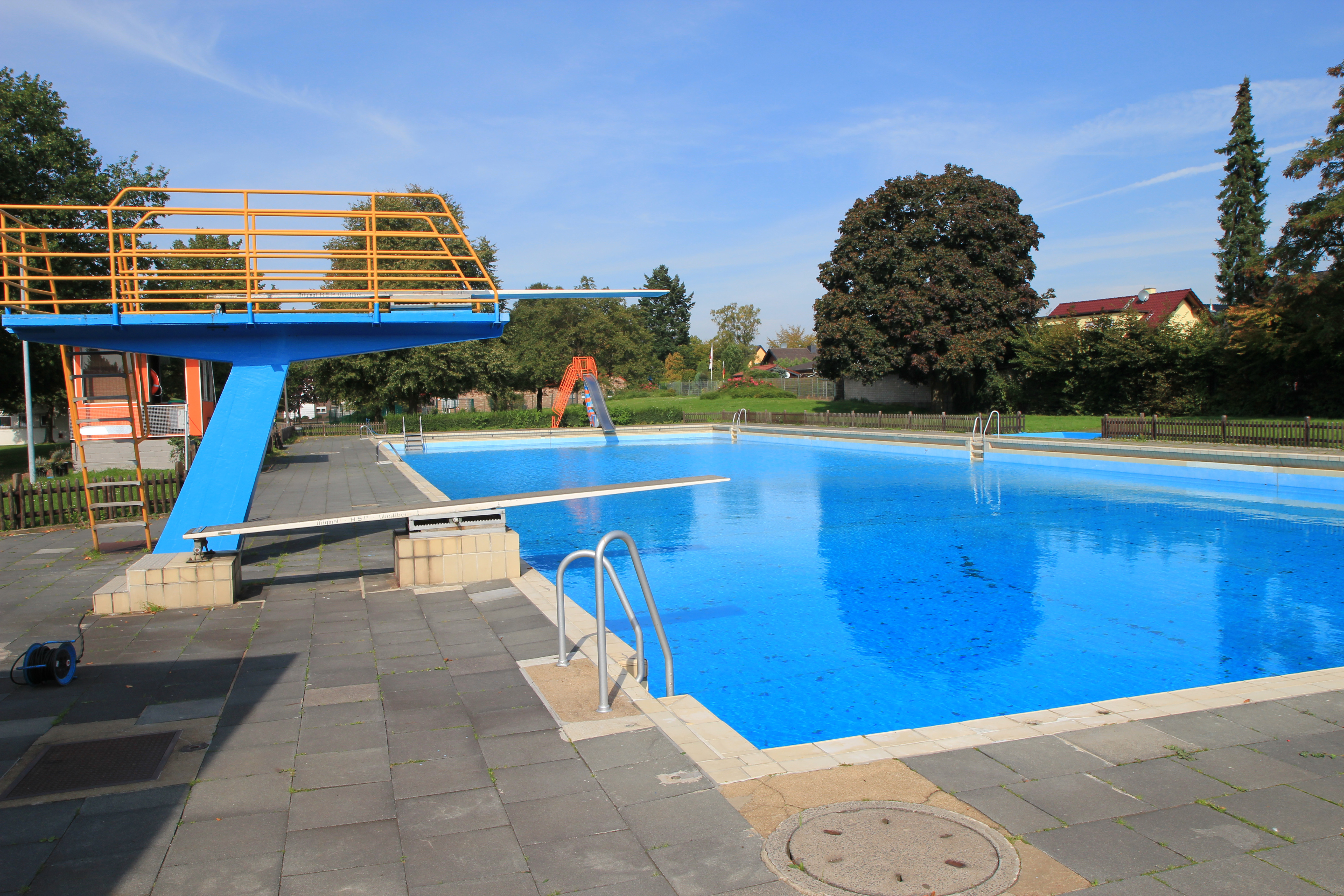 Erftstadt-Kierdorf, Freibadinitiative Kierdorf e.V.